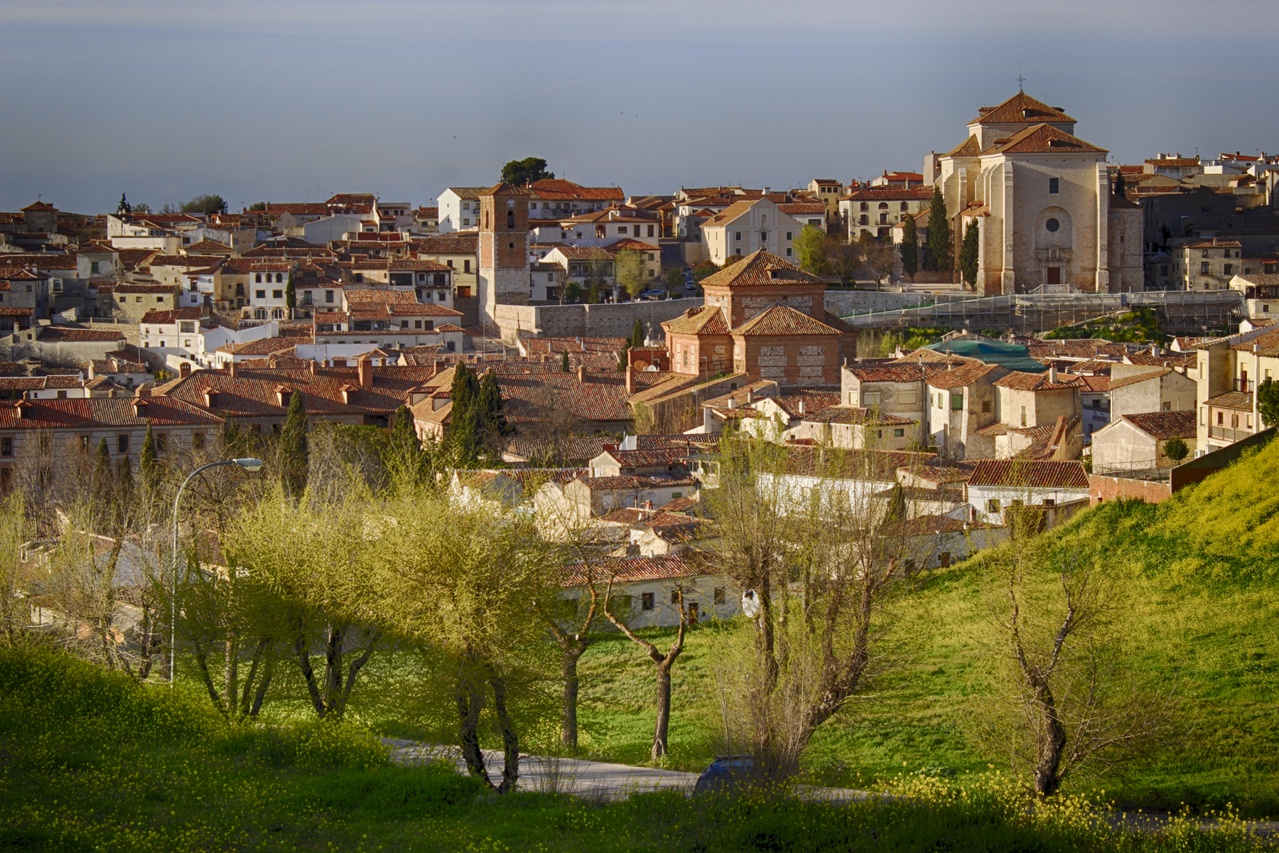 Chinchón Comunidad de Madrid España